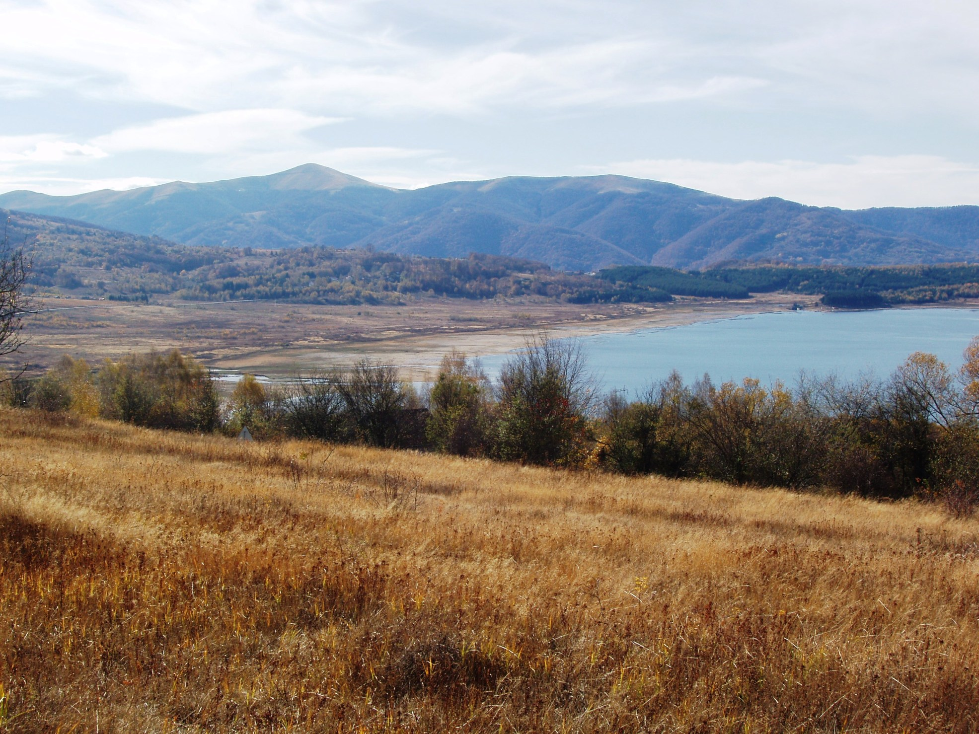 Планина